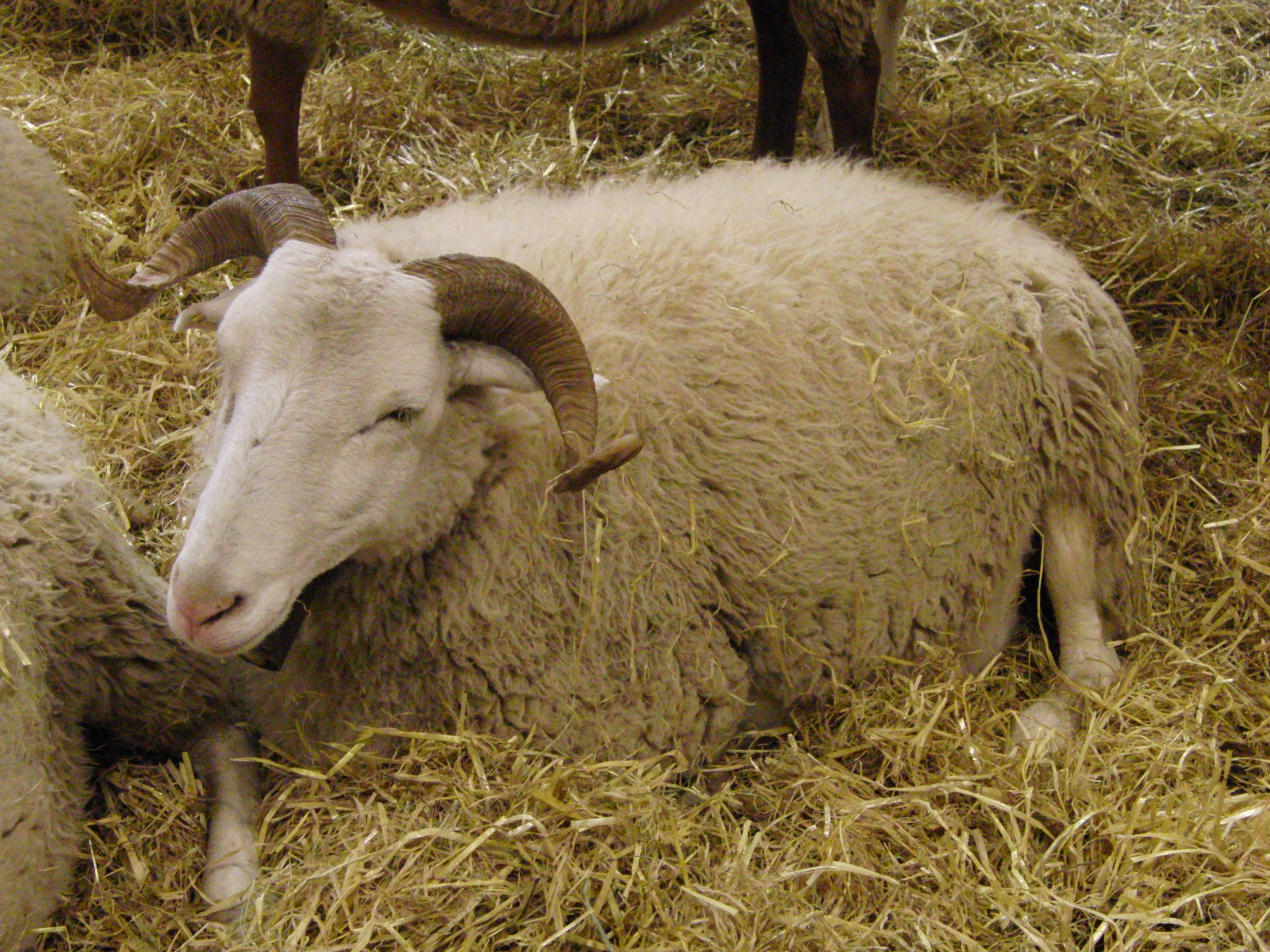 Brebis Raïole - Salon international de l'agriculture 2013, Paris, France